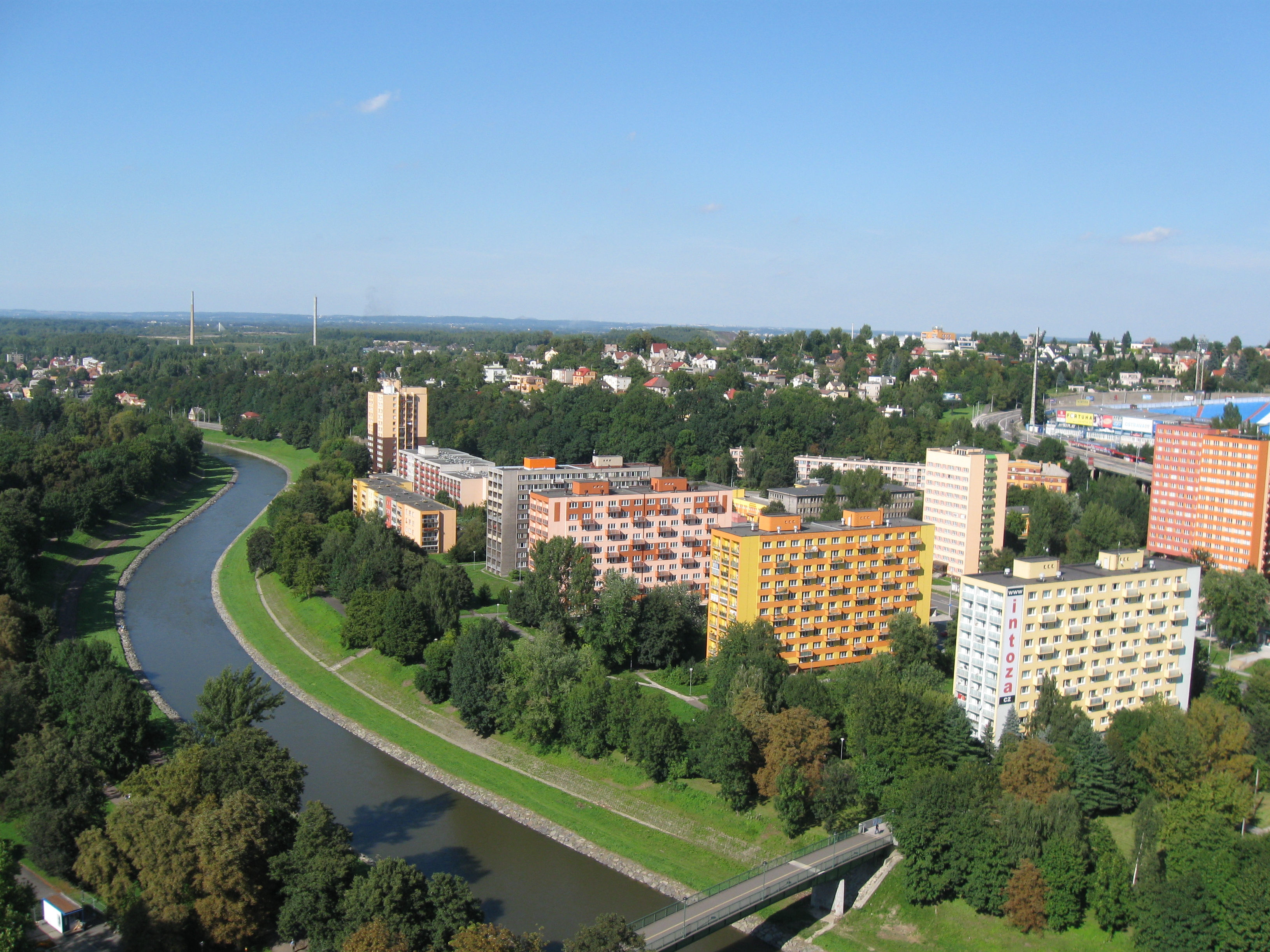 Pohled na Ostravu z Nové radnice (srpen 2011)